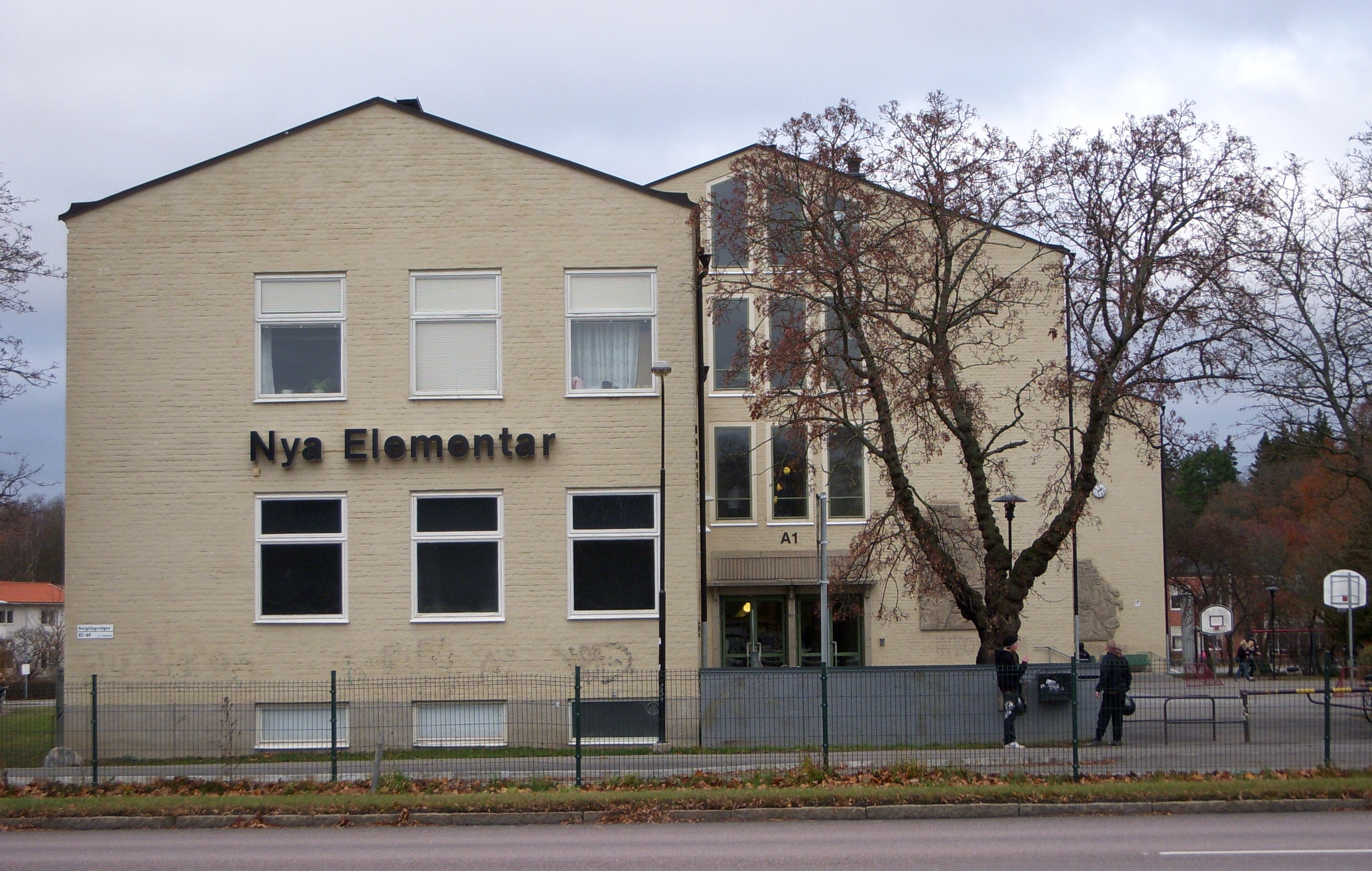 Nya Elementar, Bromma, fasad mot Bergslagsvägen